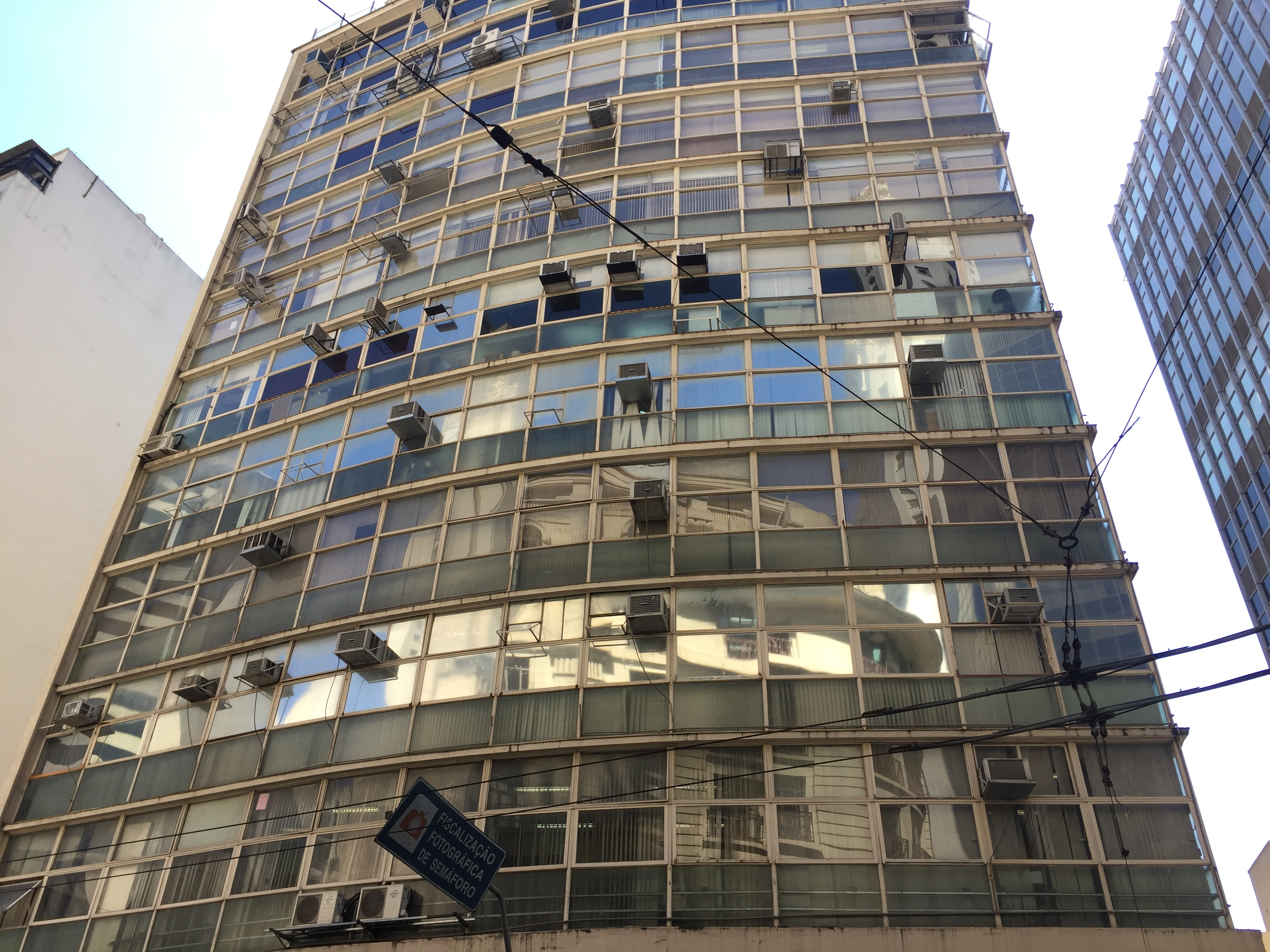 Fachada do Edifício Banco Paulista do Comércio, em São Paulo (SP), Brasil